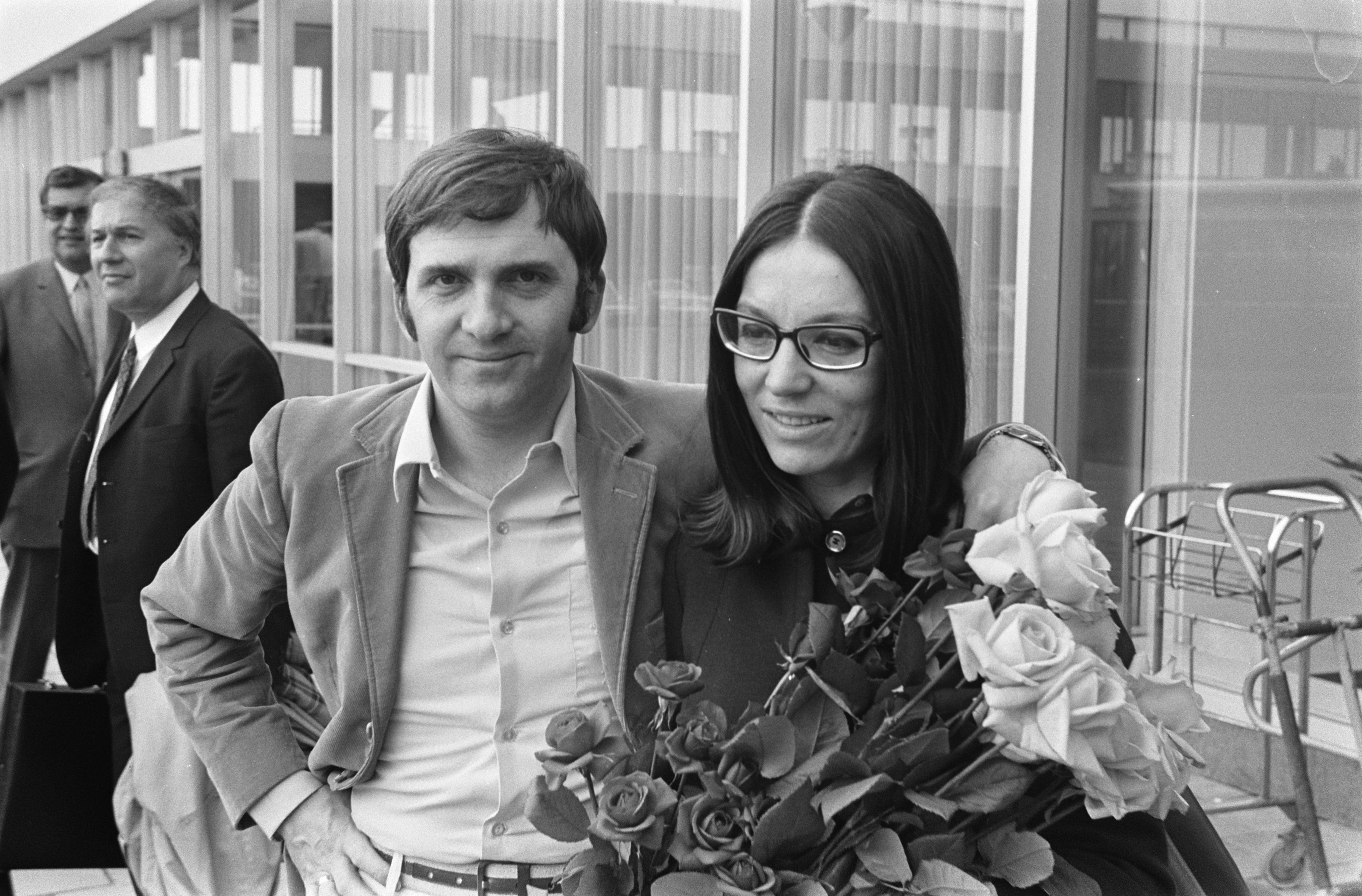 Collectie / Archief : Fotocollectie Anefo Reportage / Serie : [ onbekend ] Beschrijving : Grieks Franse zangeres Nana Mouskouri met echtgenoot George Petsilas op Schiphol Nana Mouskouri Datum : 30 mei 1969 Trefwoorden : zangeressen Persoonsnaam : Mouskouri, Nana Fotograaf : Evers, Joost / Anefo Auteursrechthebbende : Nationaal Archief Materiaalsoort : Negatief (zwart/wit) Nummer archiefinventaris : bekijk toegang 2.24.01.05 Bestanddeelnummer : 922-4746